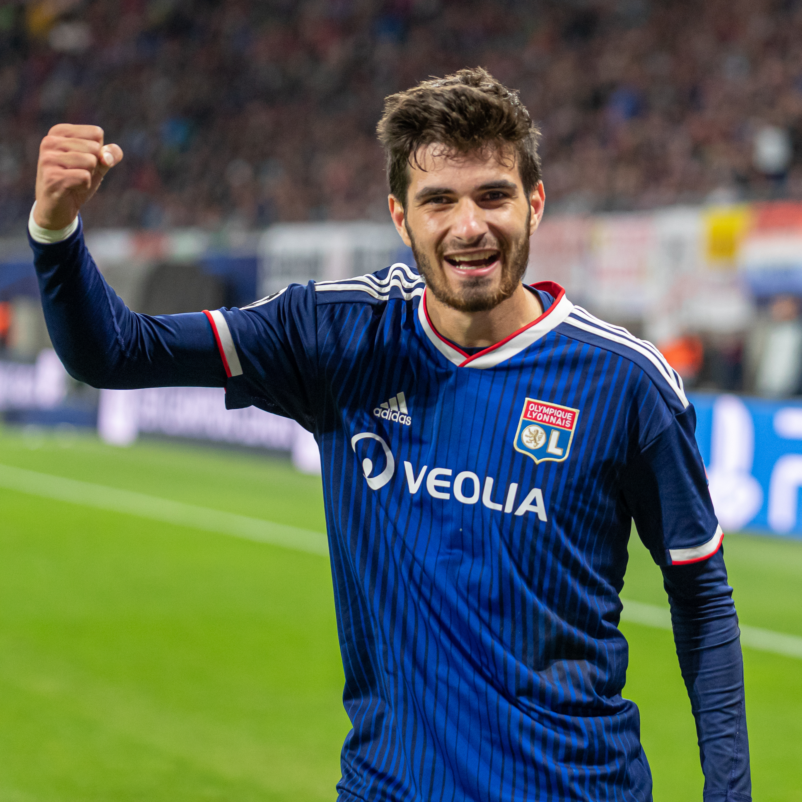 Fußball, Männer, UEFA Champions League, RB Leipzig - Olympique Lyonnais; Martin Terrier (Olympique Lyonnais, 7) jubelt über sein Tor zum 0:2 Endstand; Jubel, celebration